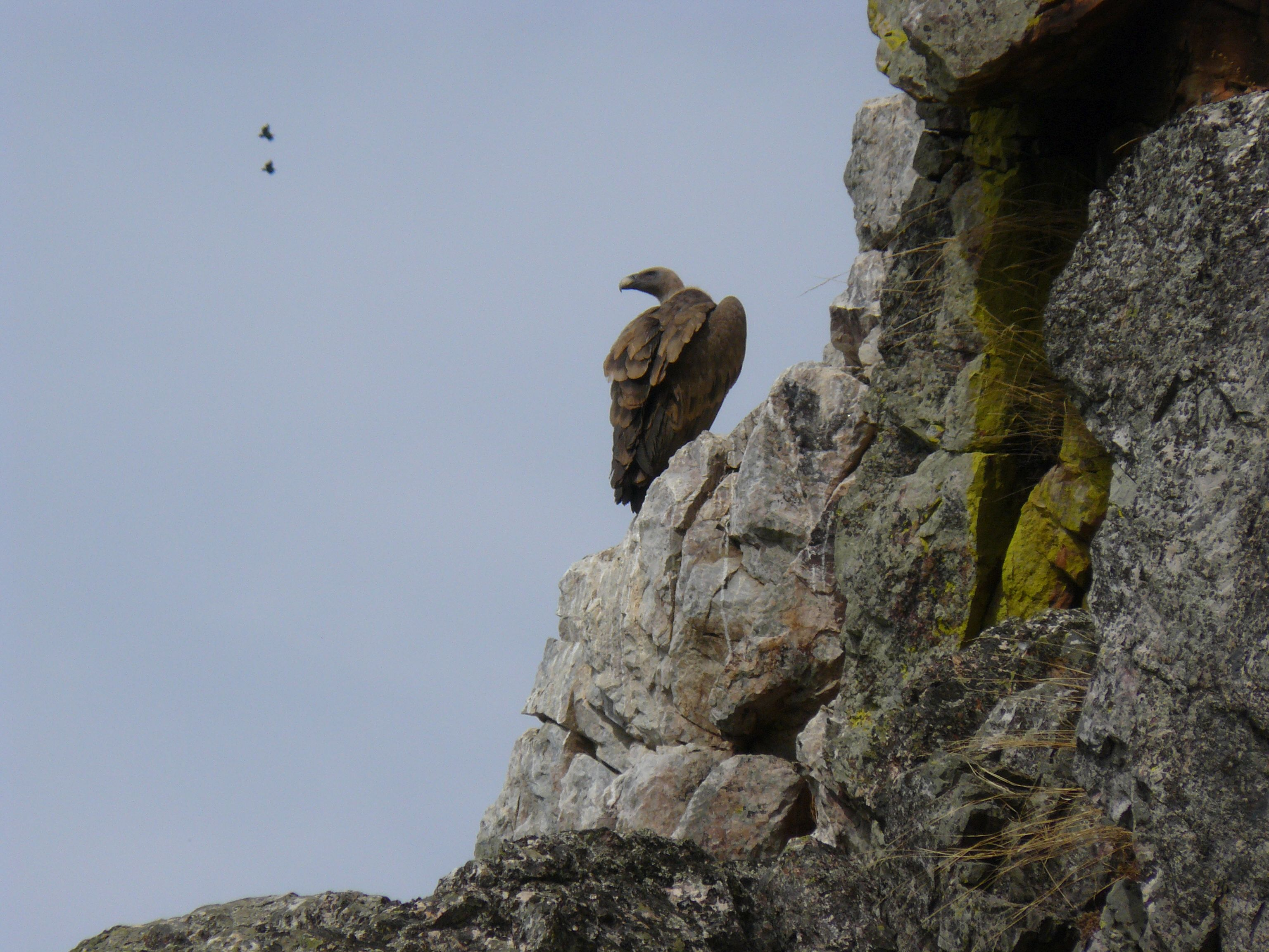 Gipo, Monfragüe, foto de Eva Hoeg.